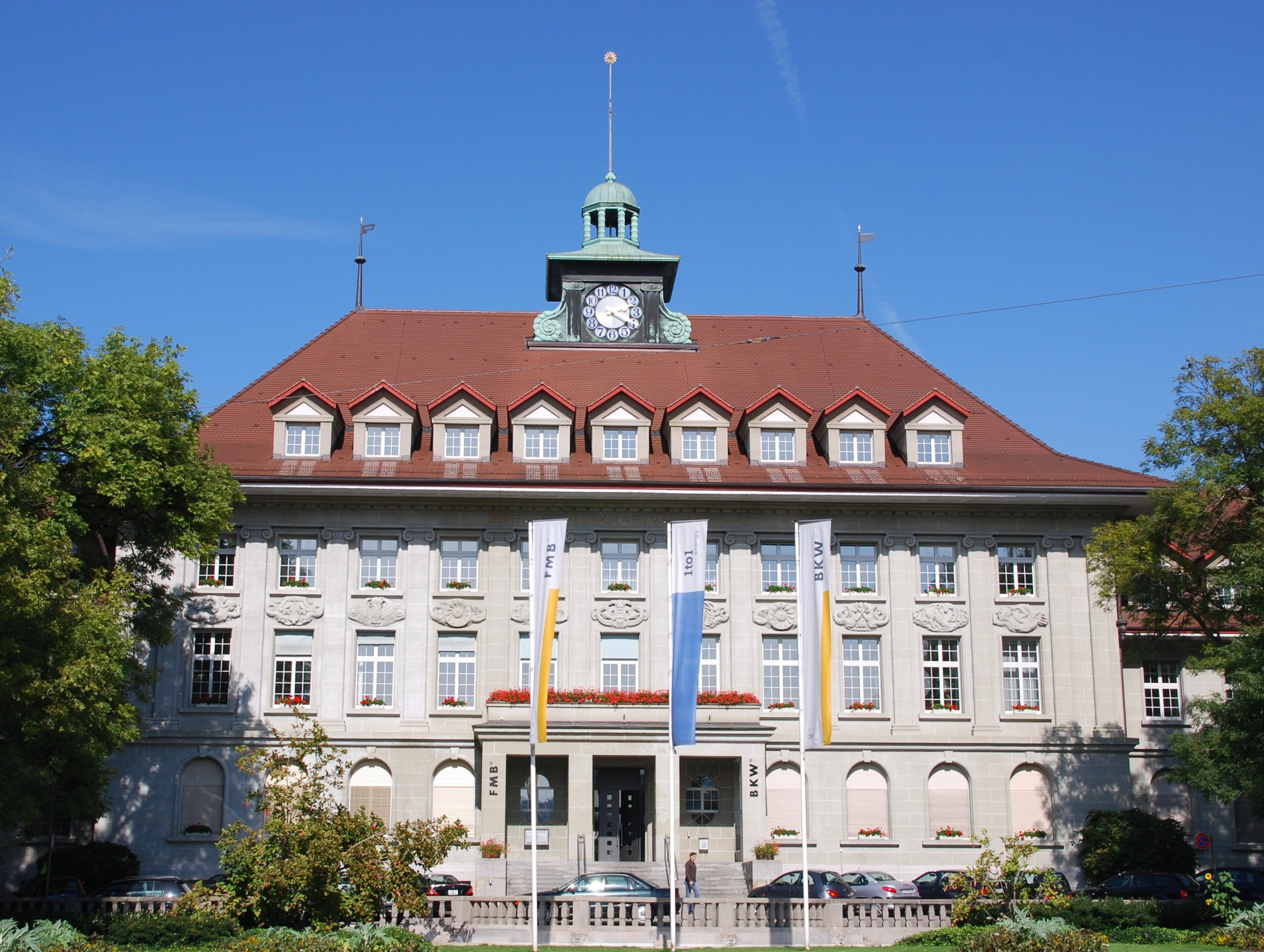 Firmensitz der BKW FMB Energy Ltd, Bern